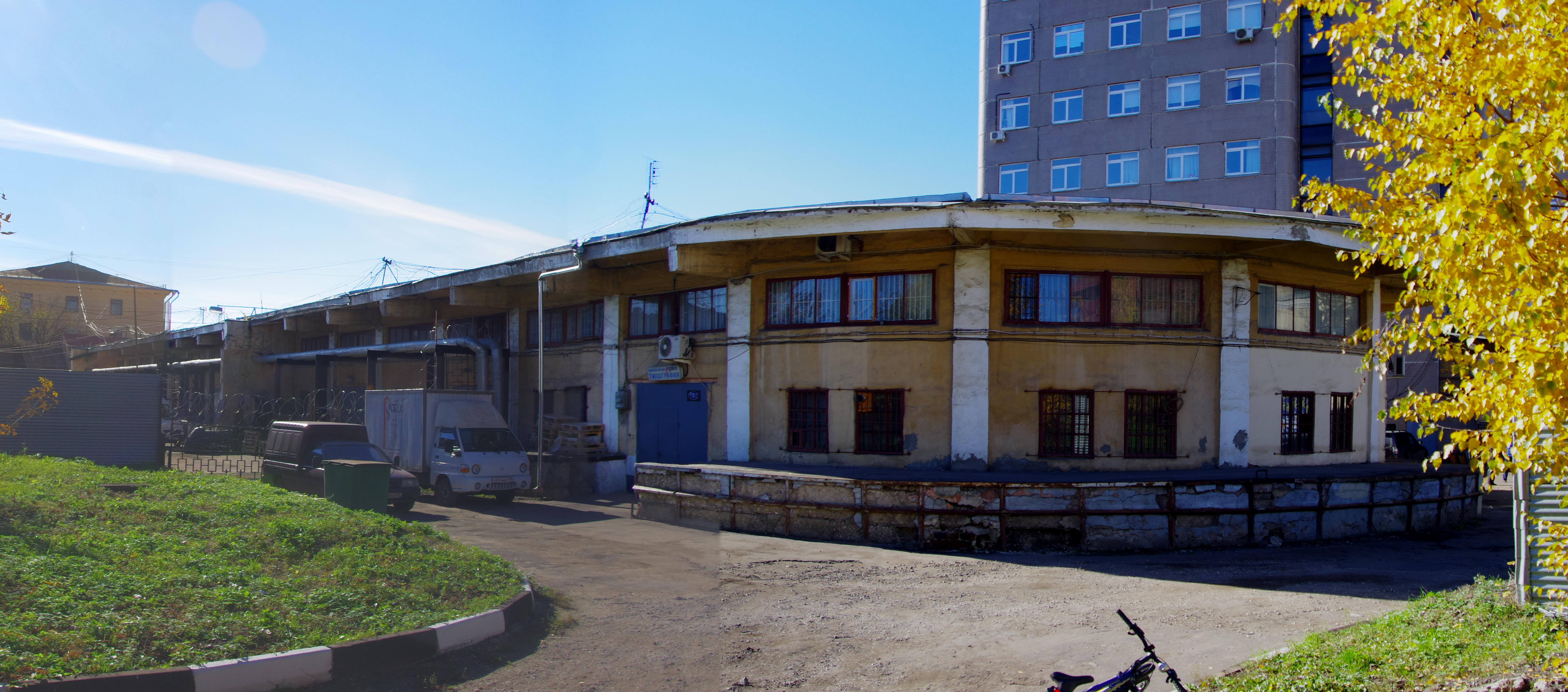 Базисный склад: Юрьевский пер., дом 13А, строение 2, Лефортово, Юго-Восточный округ, Москва